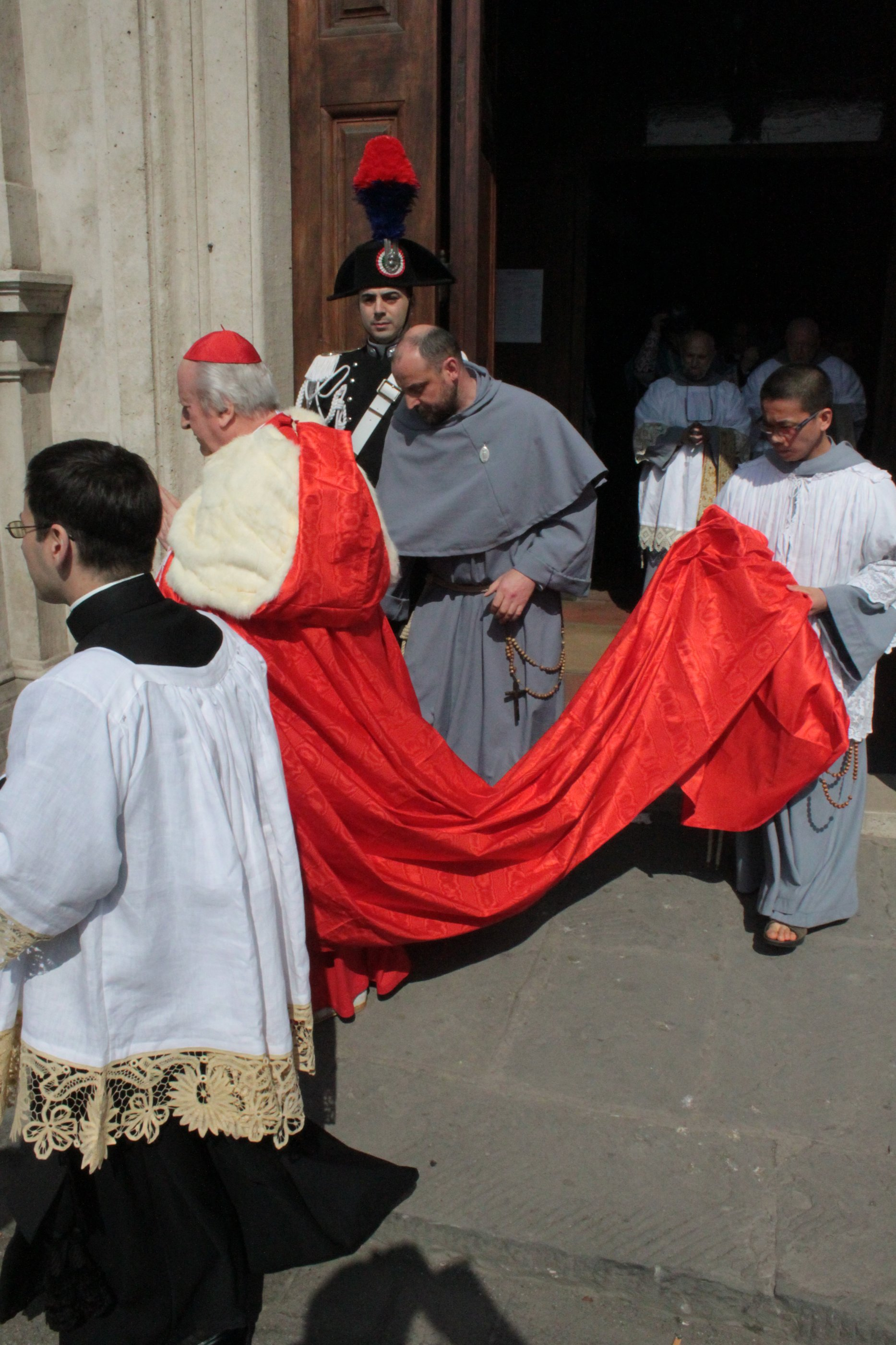 Cardinal Rodé in Cappa Magna